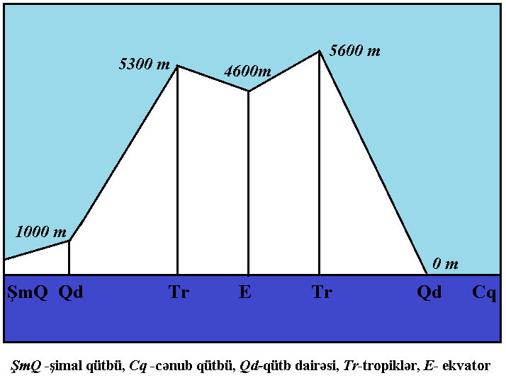 Qar xətti yüksəkliyinin enlik qanunauyğunluğu